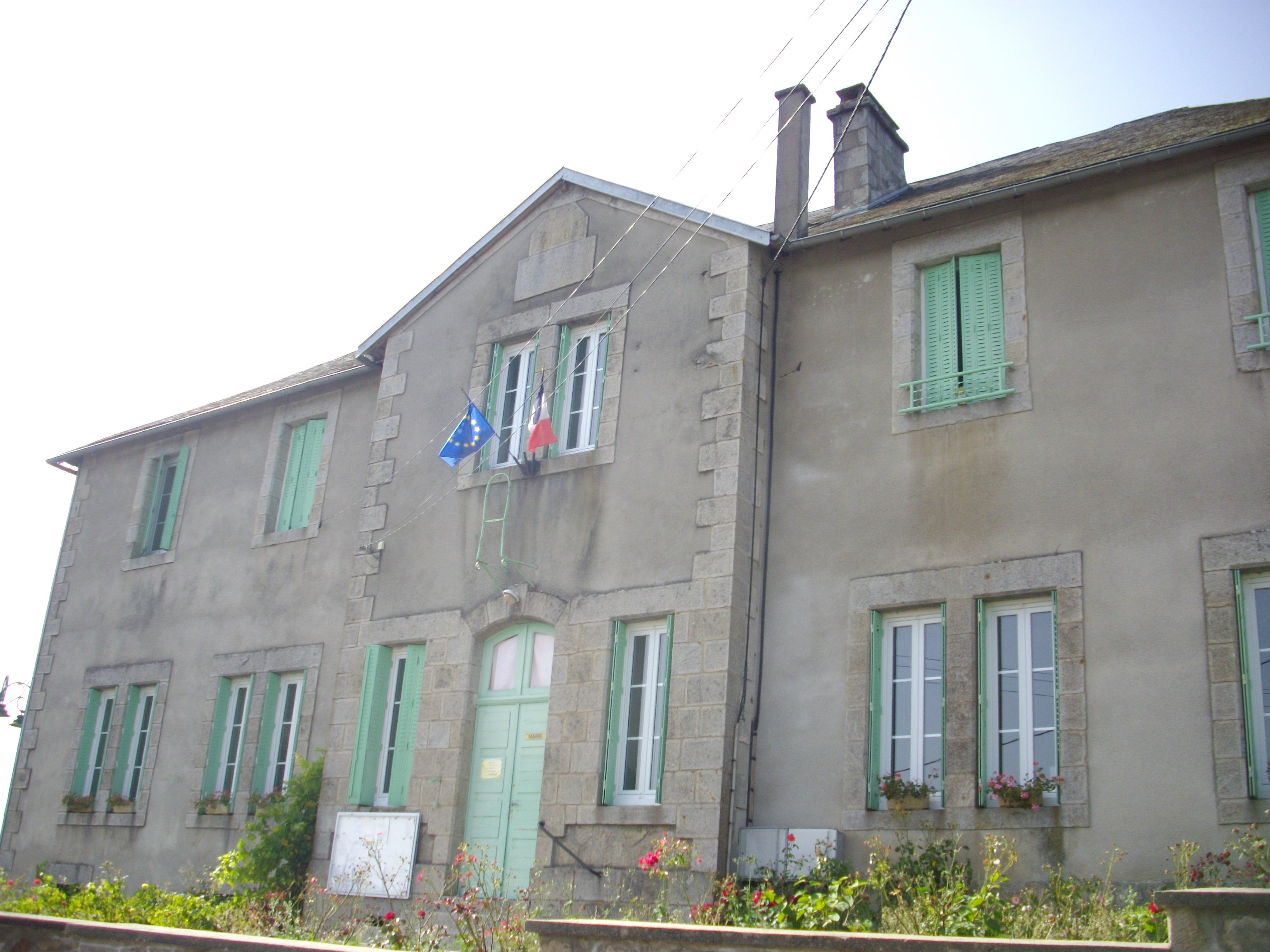 Mairie de Chirac-Bellevue (Corrèze, France)